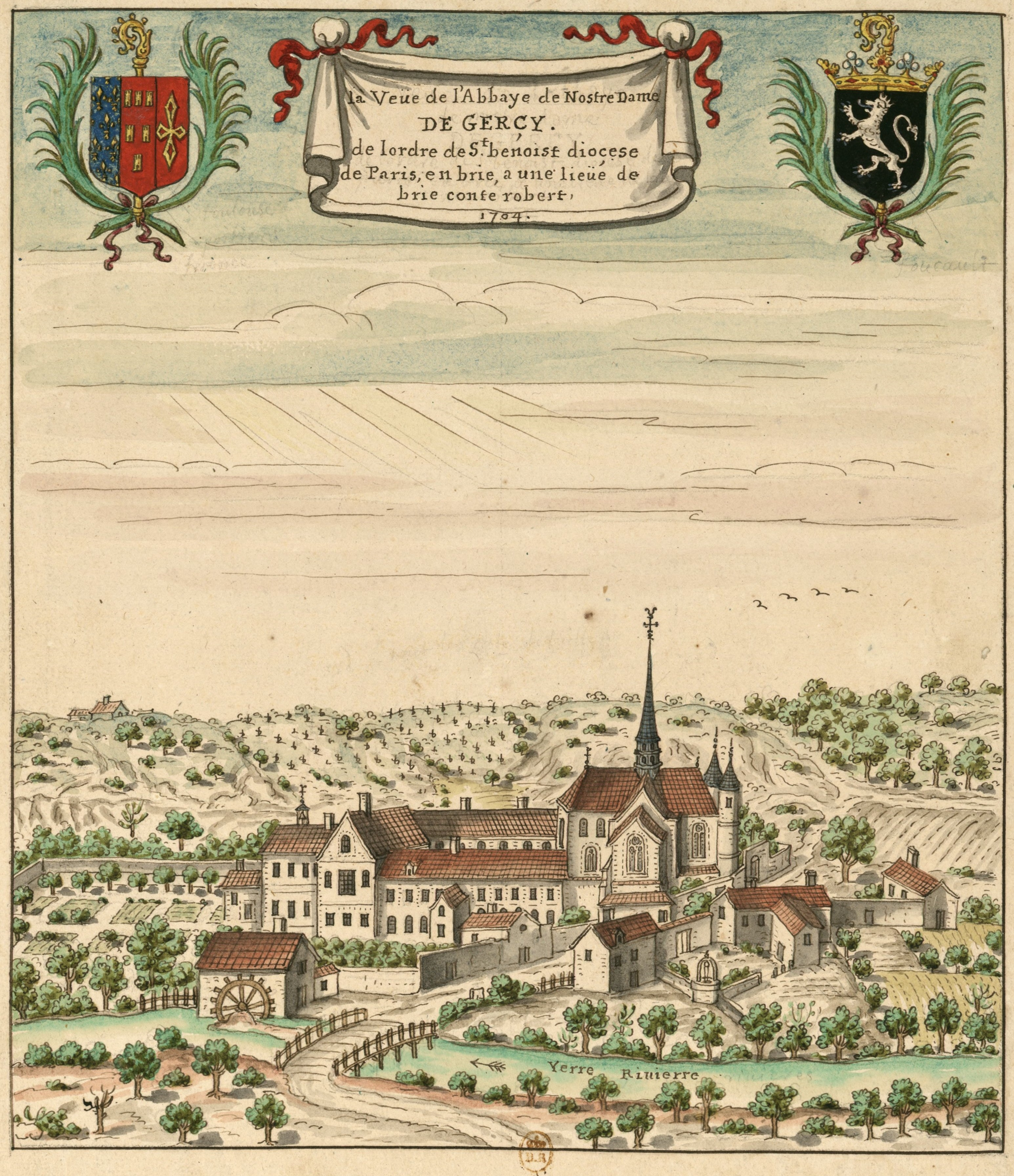 Abbaye Notre-Dame de Jarcy (Varennes-Jarcy, Essonne)